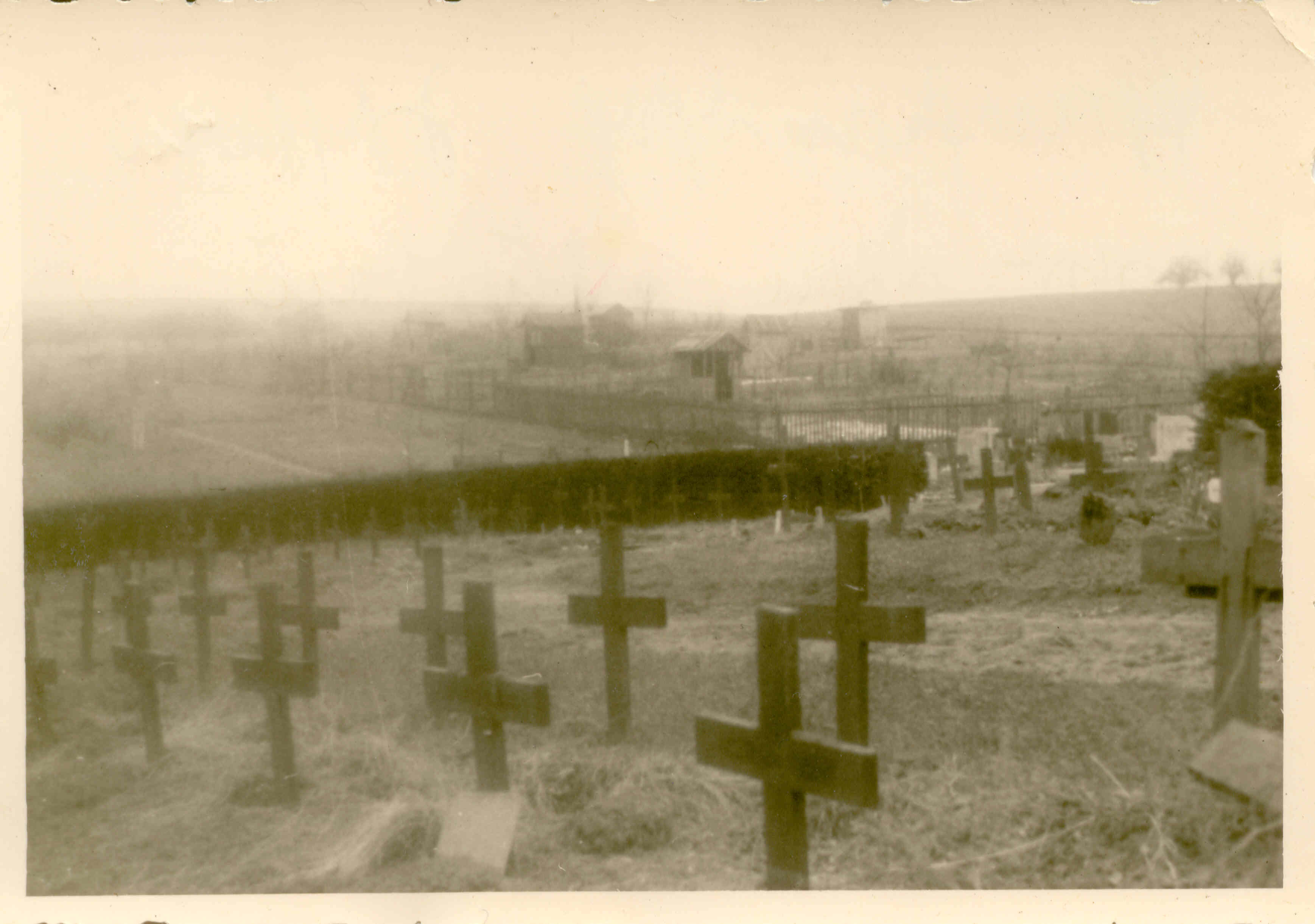 Kriegsgräberstätte Idstein vor der Umgestaltung 1956 (Bezeichnung und Datum laut Bildunterschrift des Fotografen im WP-Artikel.)